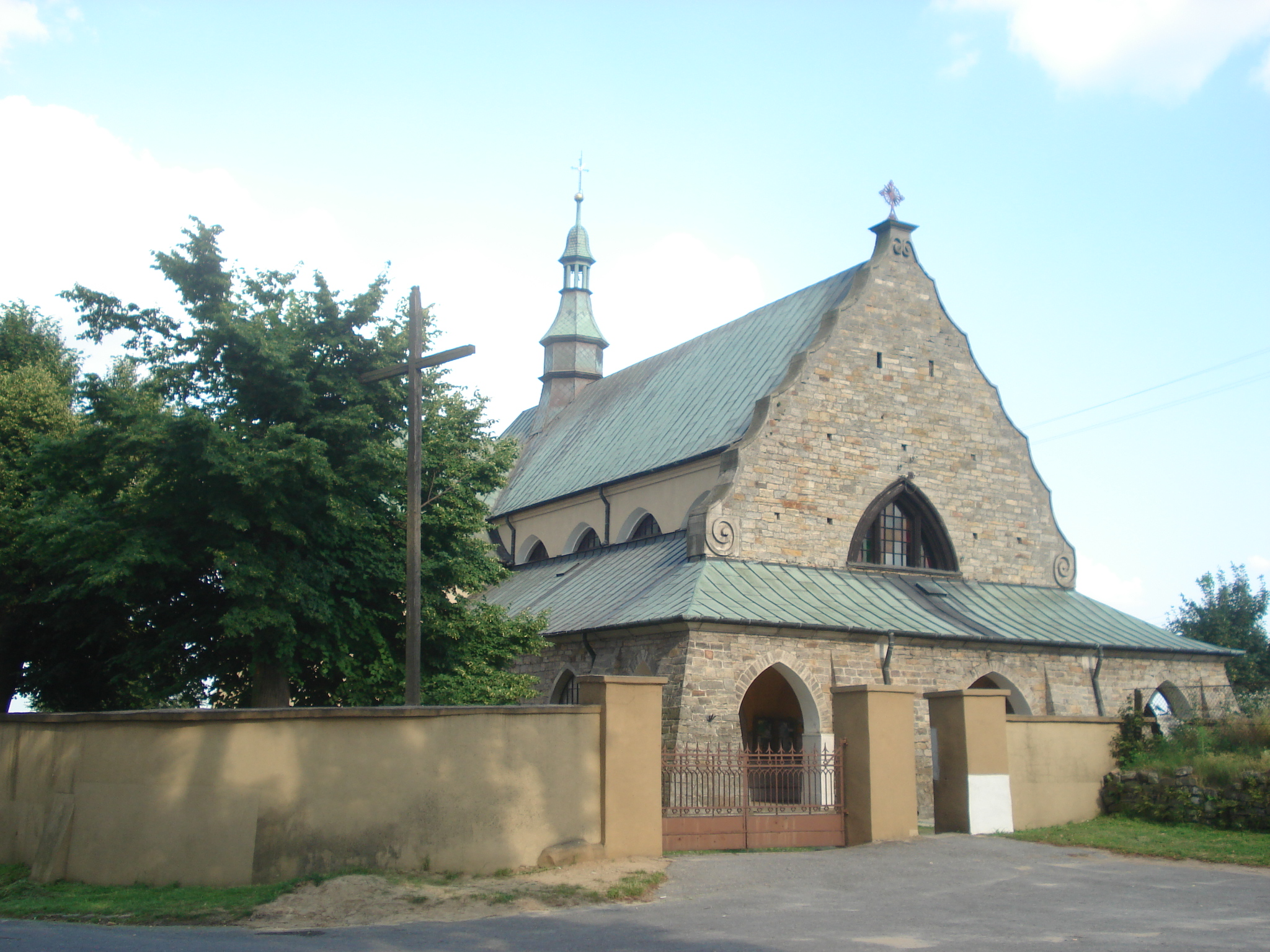 Kościół św. Stanisława w Chlewiskach